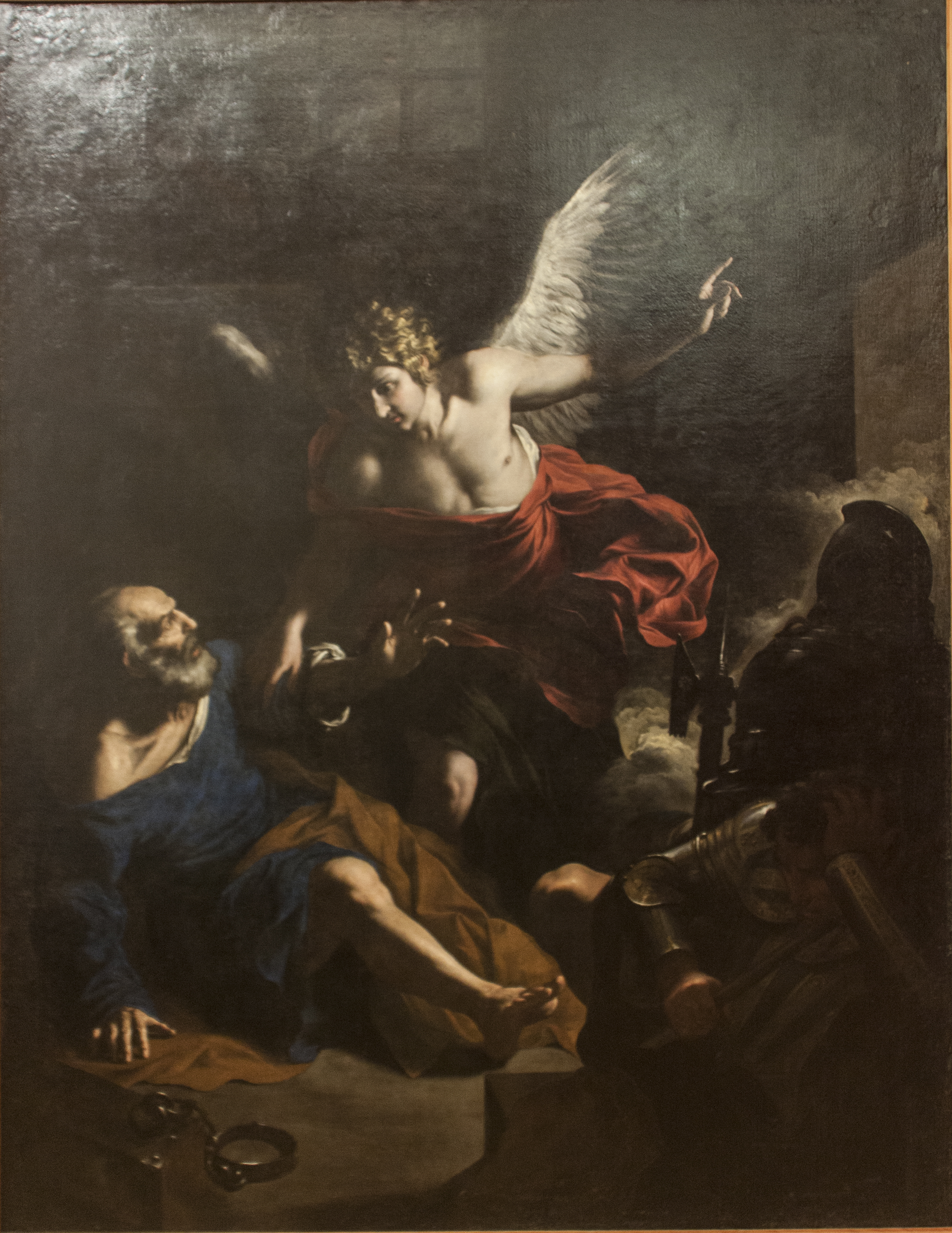 San Pietro liberato dal carcere - Pietro Novelli olio su tela 260x198 cm Proveniente da Chiesa di San Pietro in vicoli, Palermo